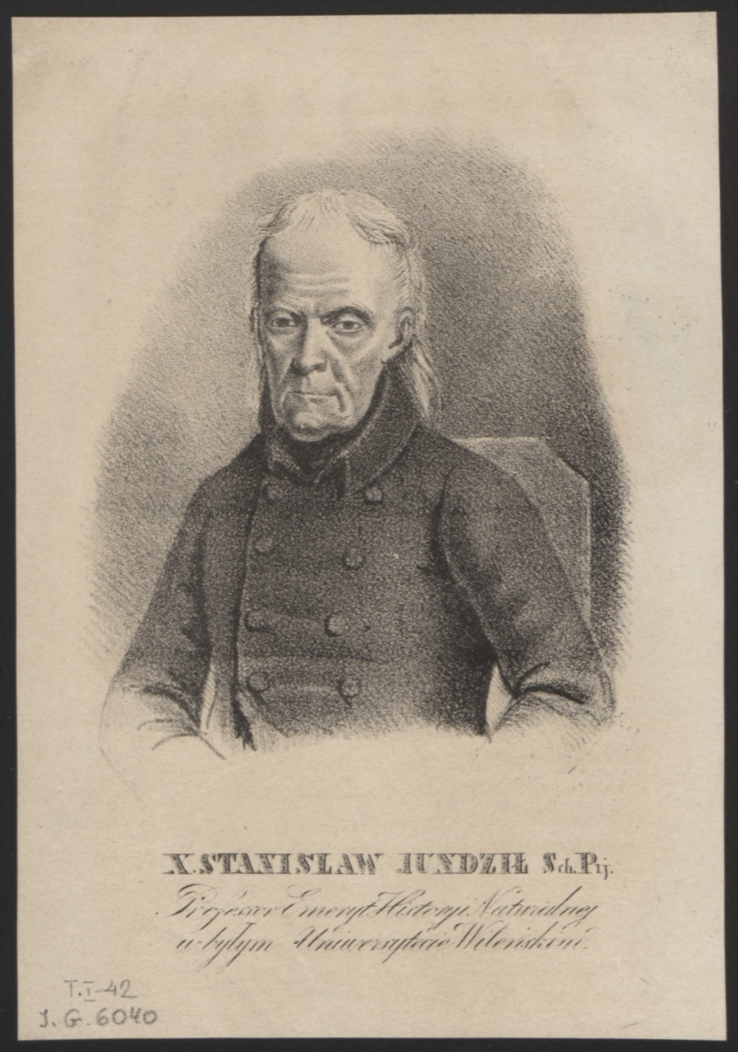 Беларуская (тарашкевіца): Партрэт Станіслава Юндзіла (Stanisłaŭ Jundził)